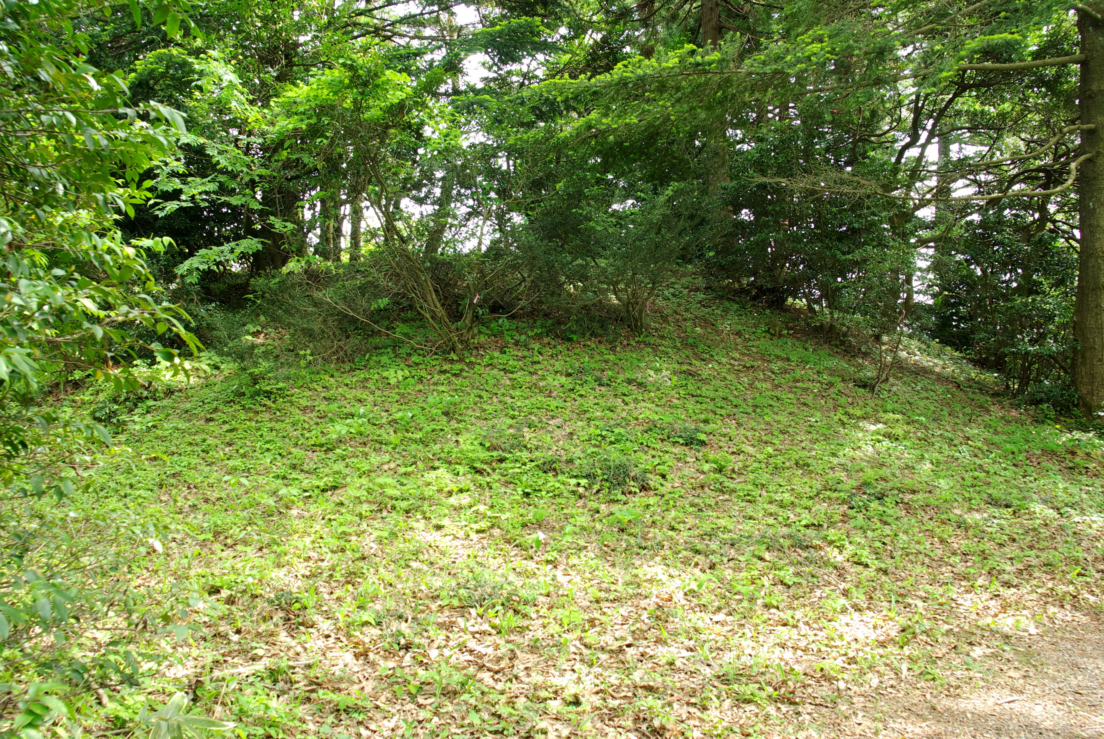 石川県中能登町雨の宮3号墳